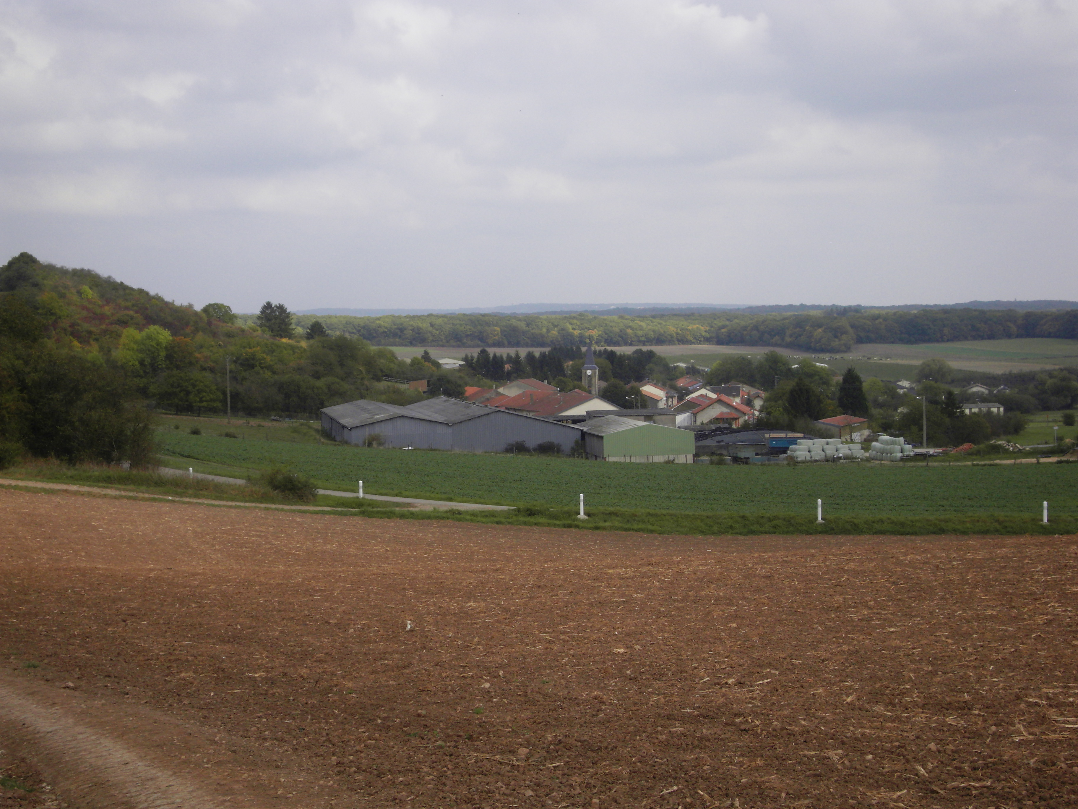 Chanville (Moselle), vue sur le village